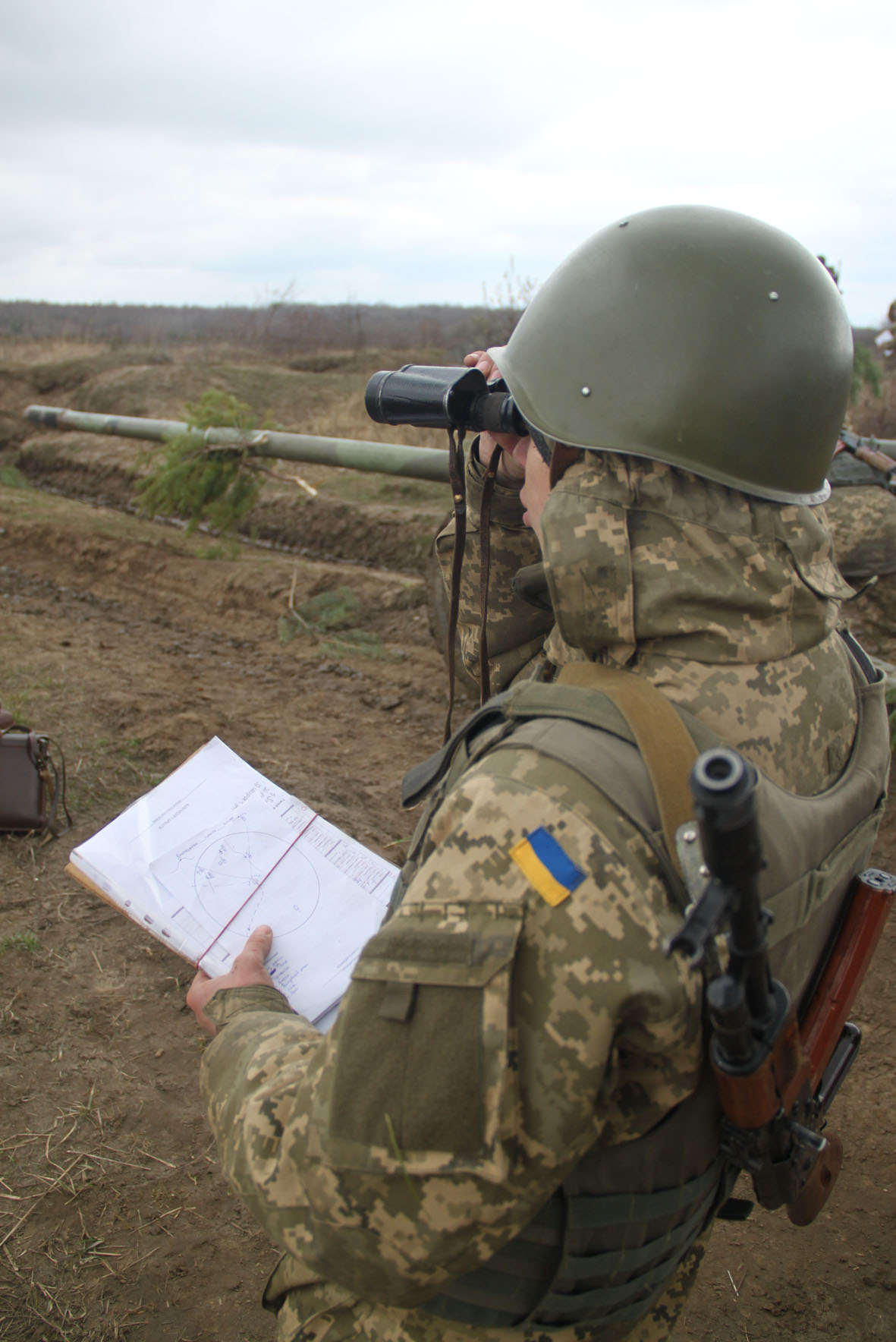 Artillery training Фото Антон Миронович